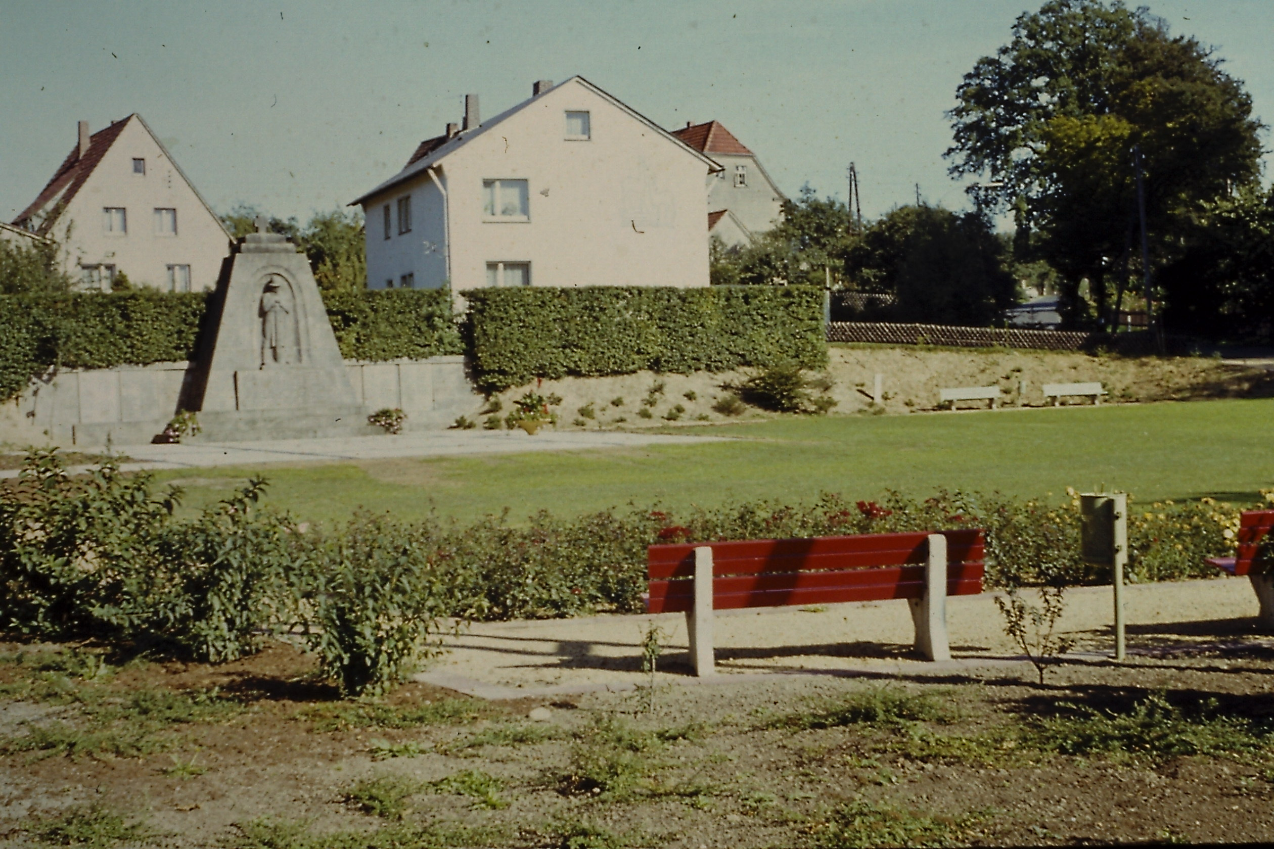 Deutschland (D) - Nordrhein-Westfalen (NW) - Kreis Lippe (LIP) - Bad Salzuflen - Wüsten: Kriegerdenkmal